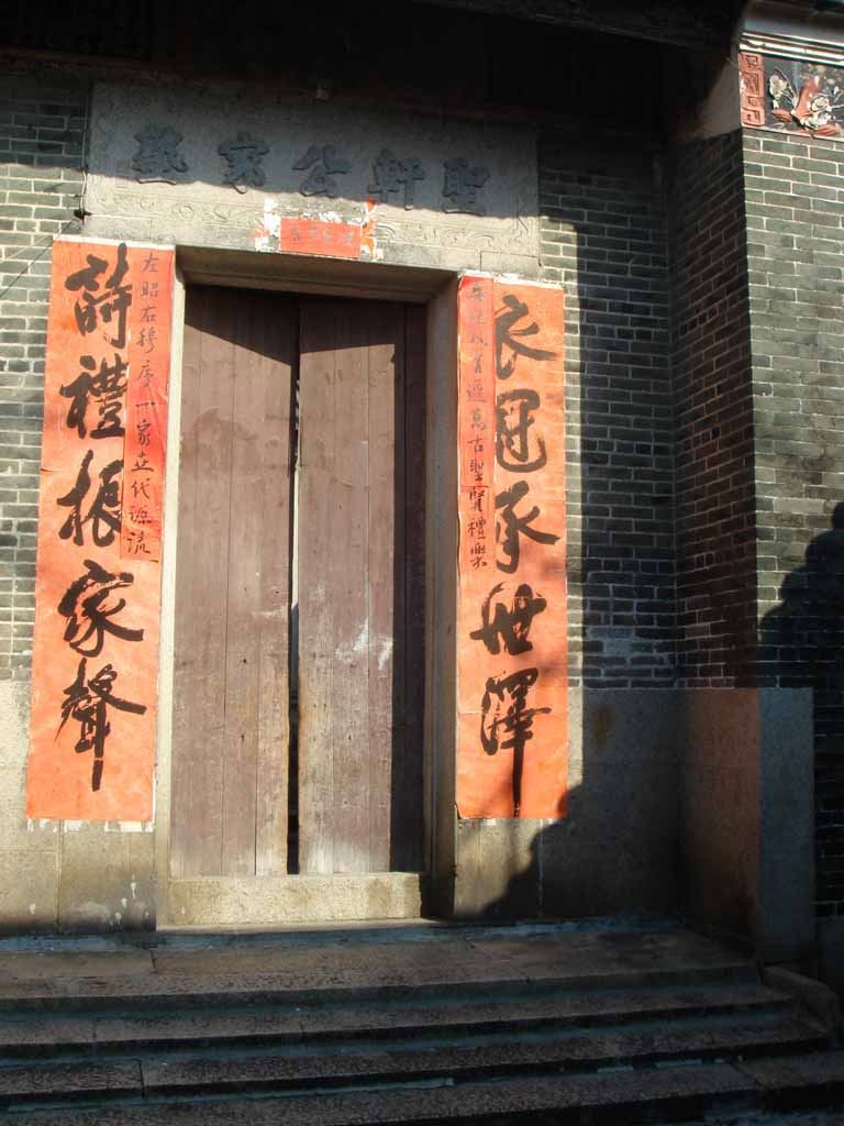 中文（香港）: 聖軒公家塾。